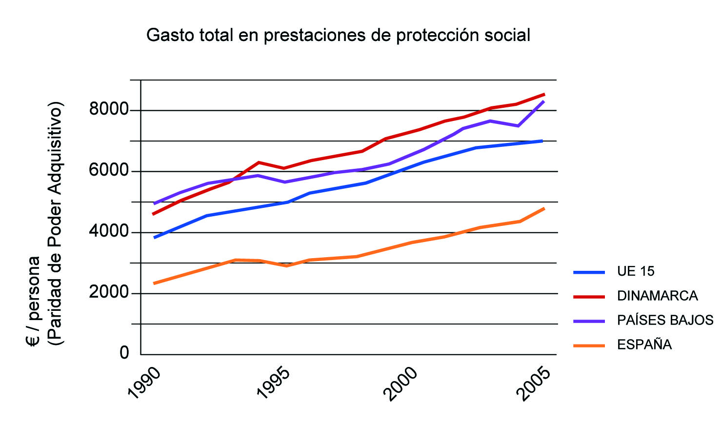 Comparación gasto prestaciones sociales 1990-2005